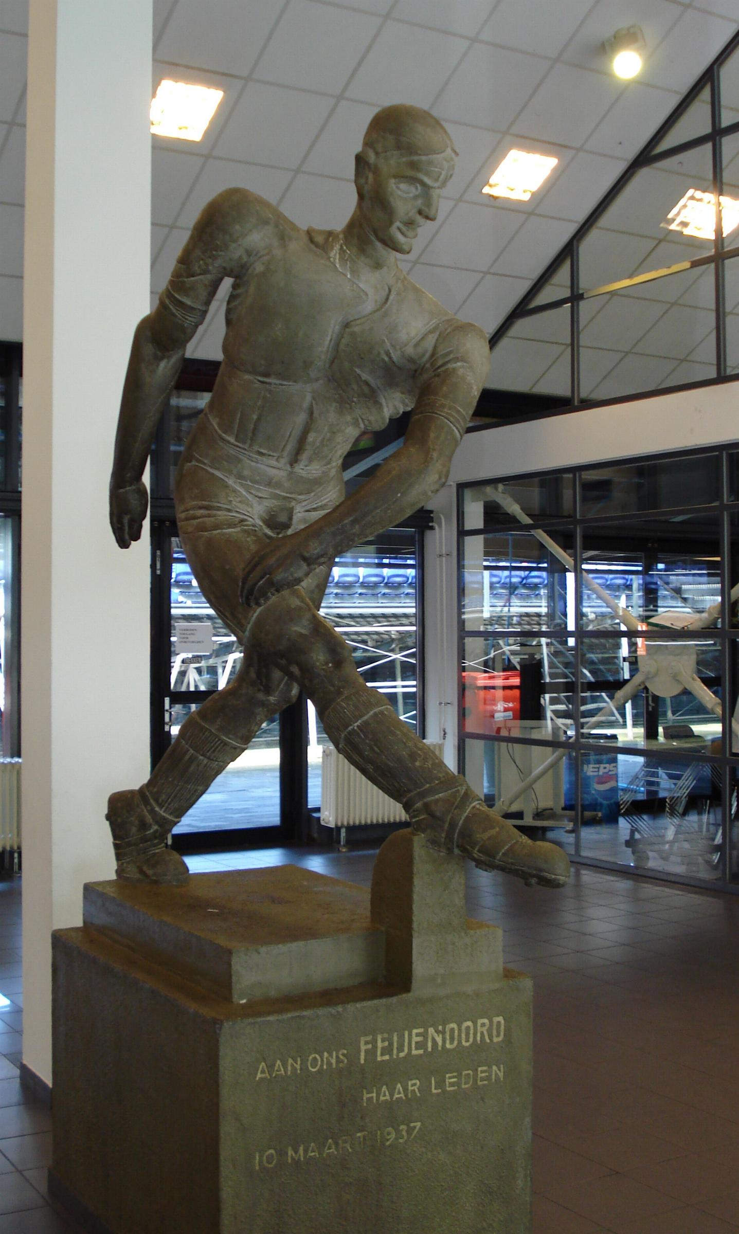 Rotterdam, Feyenoord stadion. Kunstwerk "De voetballer" van Hendrik Chabot. Rotterdam/The Netherlands.